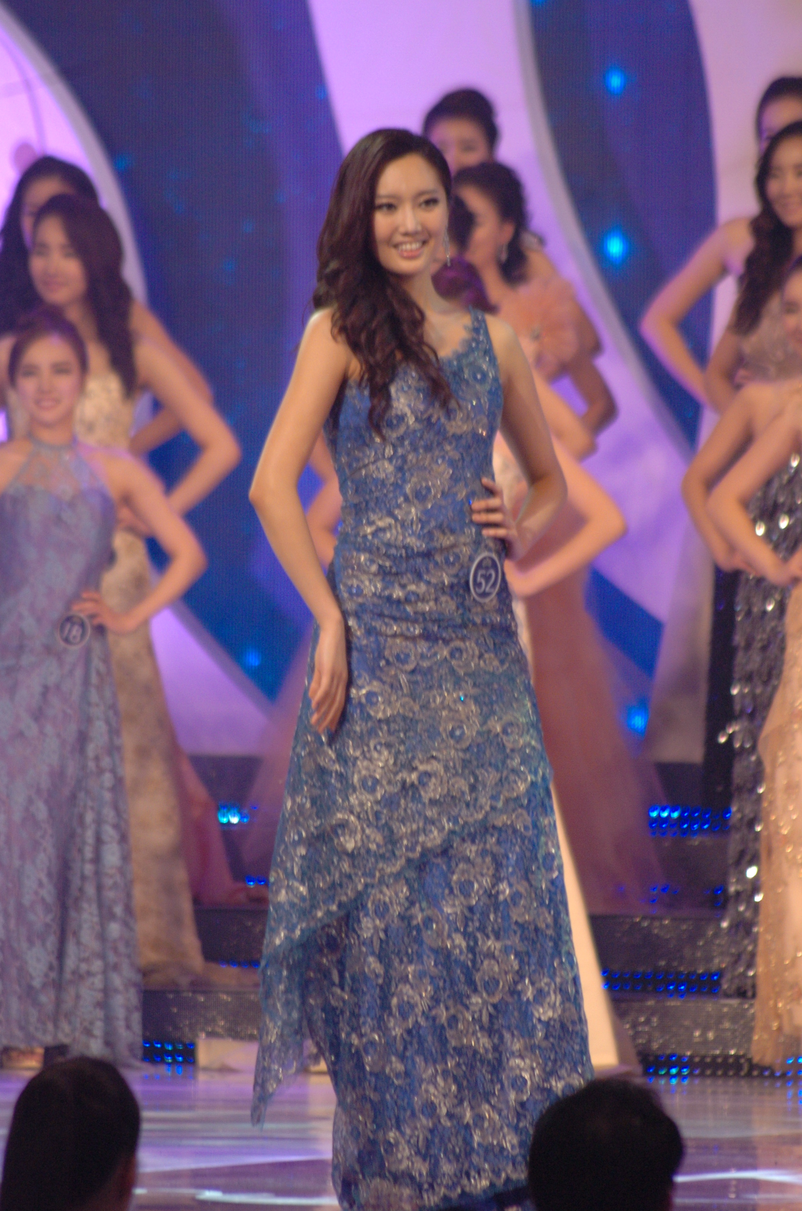 2012 미스코리아 선 김사라(서울 선) 드레스 심사